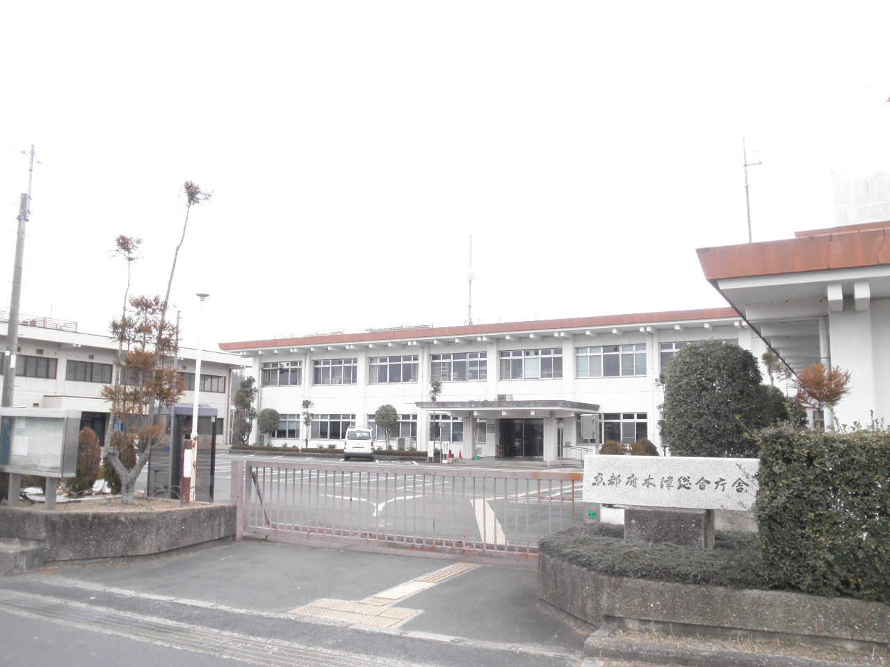 京都府木津総合庁舎